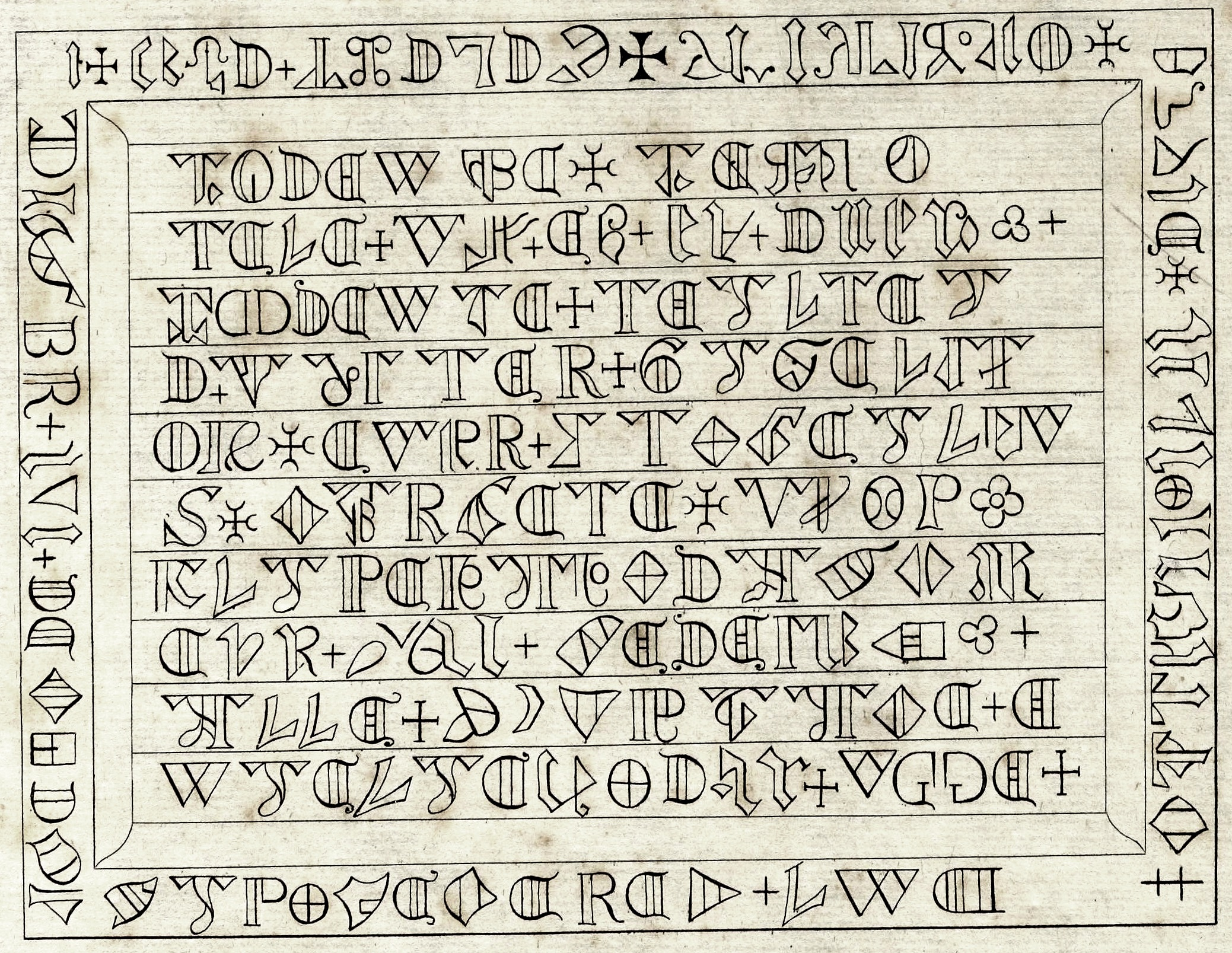 Nachzeichnung der Inschrift von Heilsberg, Weimar 1818